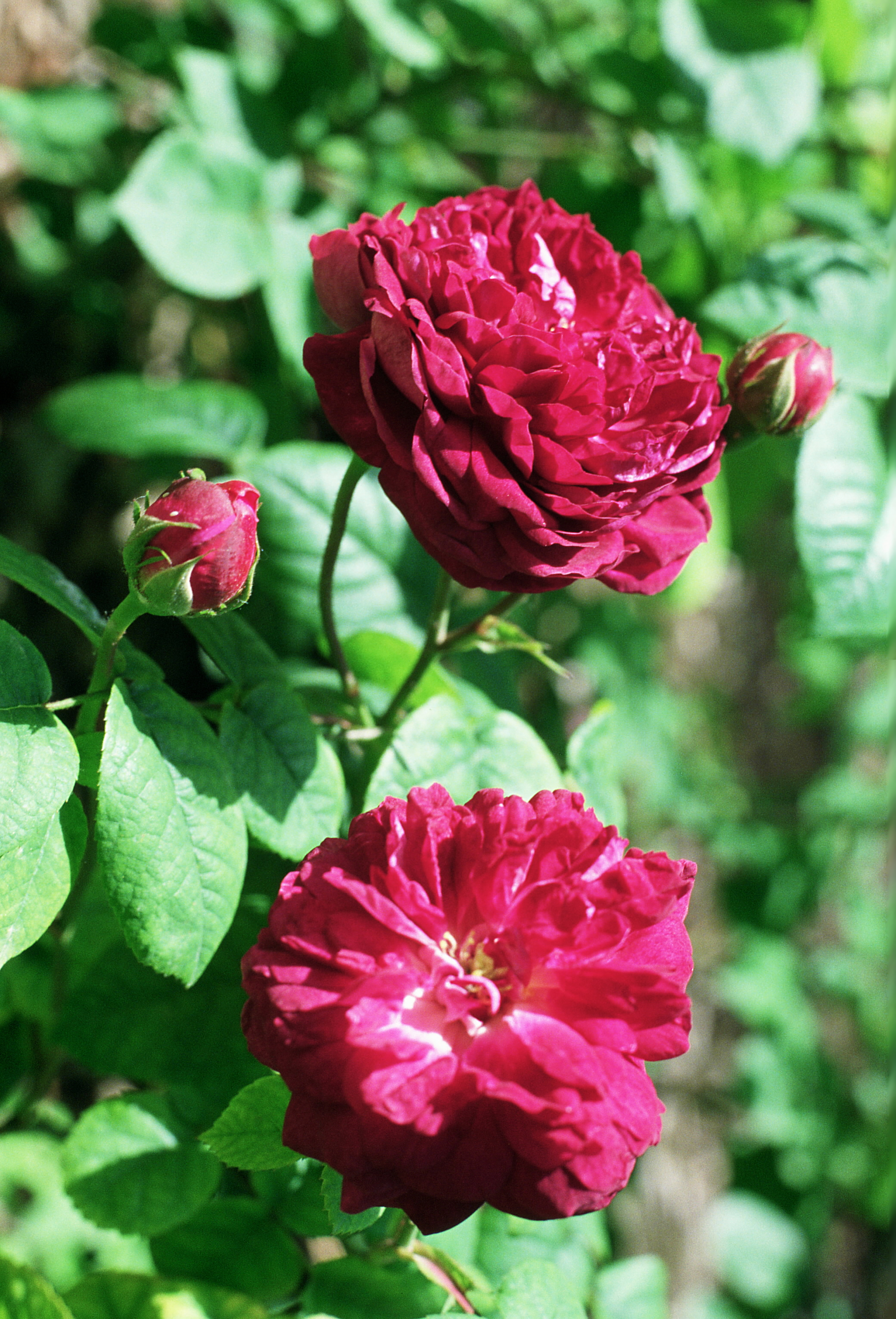 Rosa 'Cardinal de Richelieu', gr. Gallicas, sect. Rosa. Real Jardín Botánico, Madrid, mayo 1988, A. Barra.